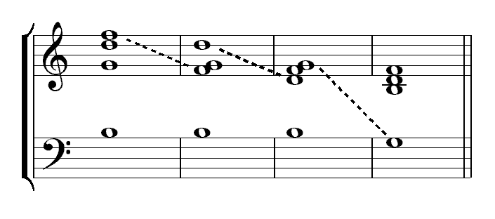 Description : Trouver la fondamentale Source : Personnelle Licence : GFDL